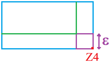 Fonction holomorphe sauf en Z4 où elle est continue : on isole ce point dans un rectangle aussi petit que voulu